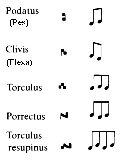 некоторые лигатуры невменной нотации, с расшифровкой